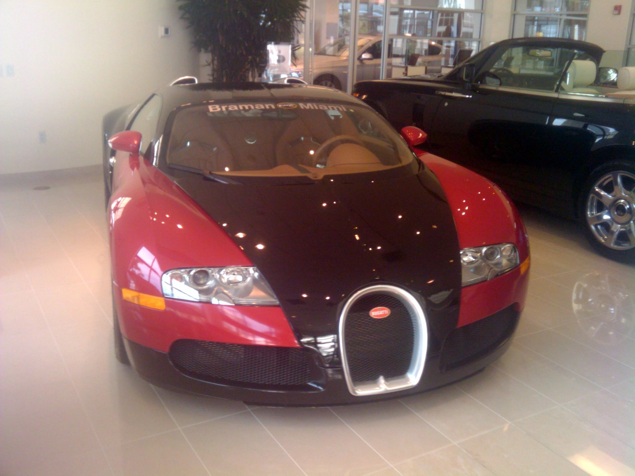 Bugatti Veyron @ Braman Motors, Miami FL